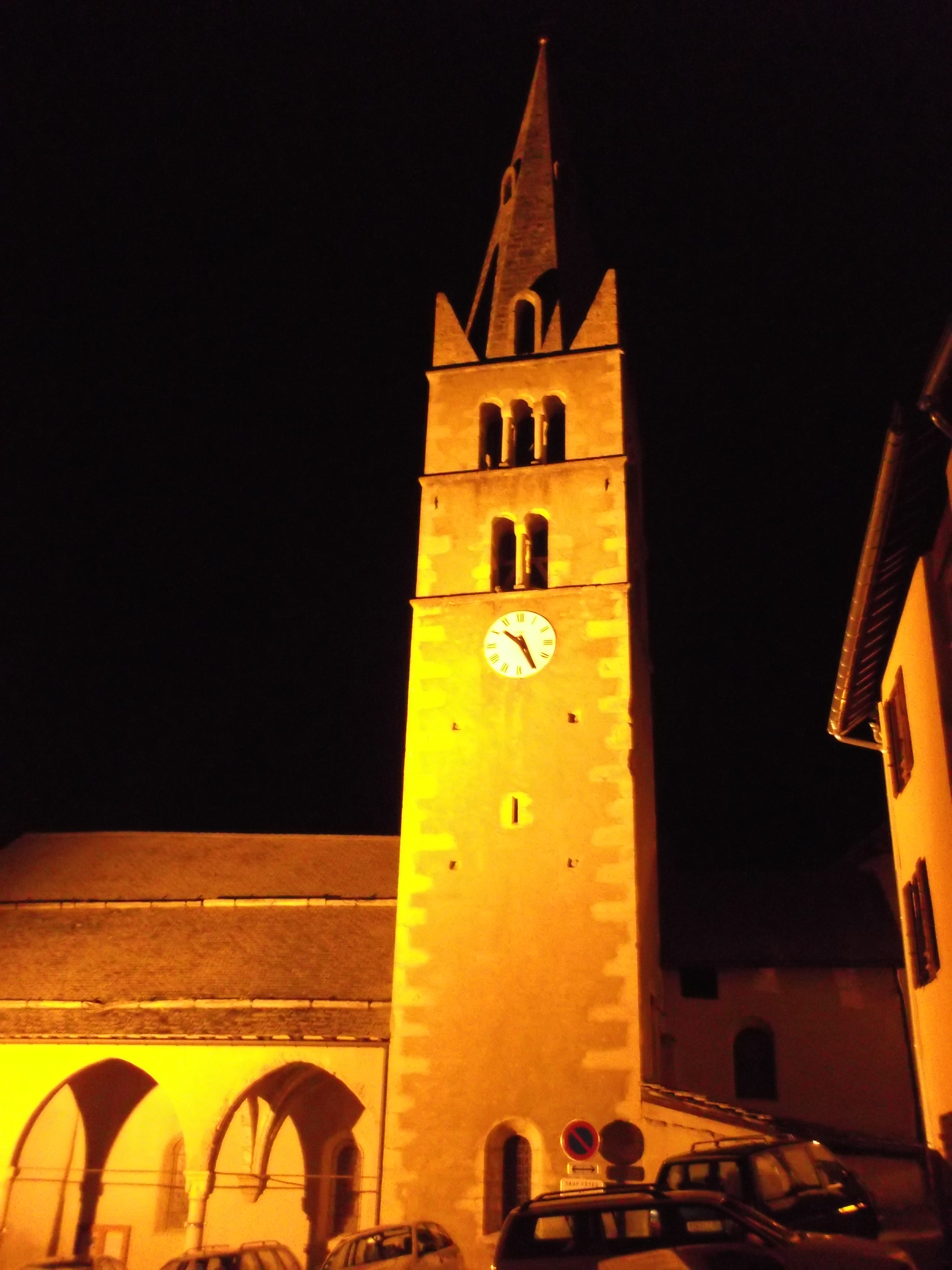 Église de Risoul (Inscrit) .